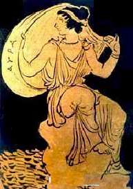 Ninfa sentada. Su manto es ondeado por la suave brisa.